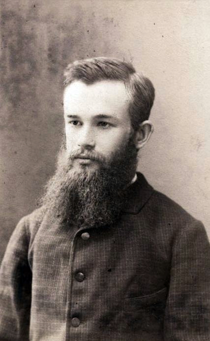 Михайло Грушевський. Київ, кінець 1880-х – початок 1890-х рр.